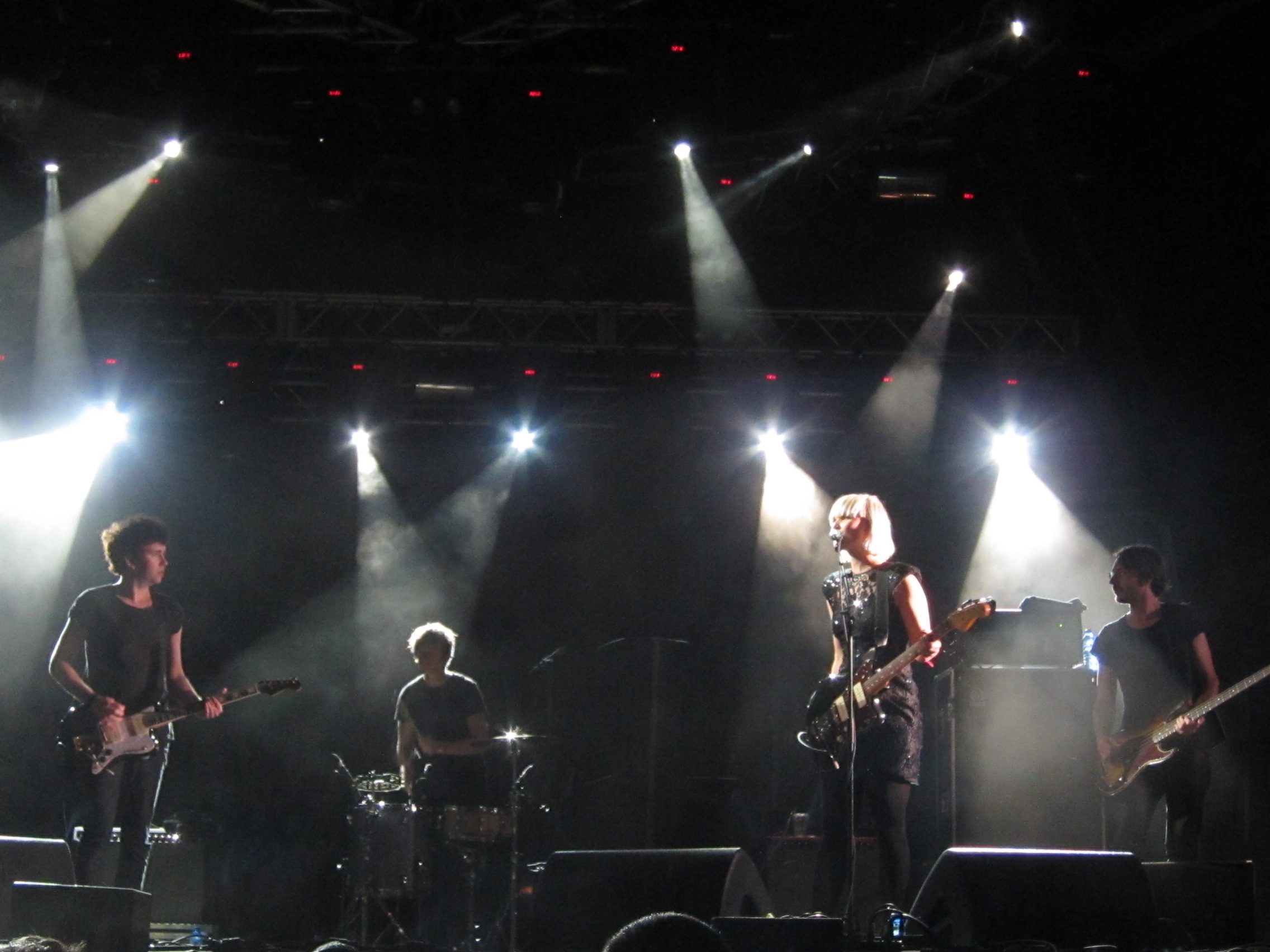 Cultura Quente Caldas de Reis 17 Jul 2010